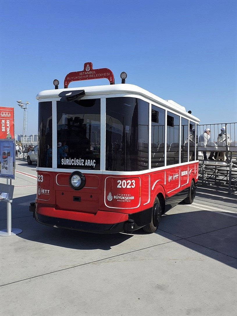 İETT'nin sürücüsüz elektrikli aracı, Teknofest 2019